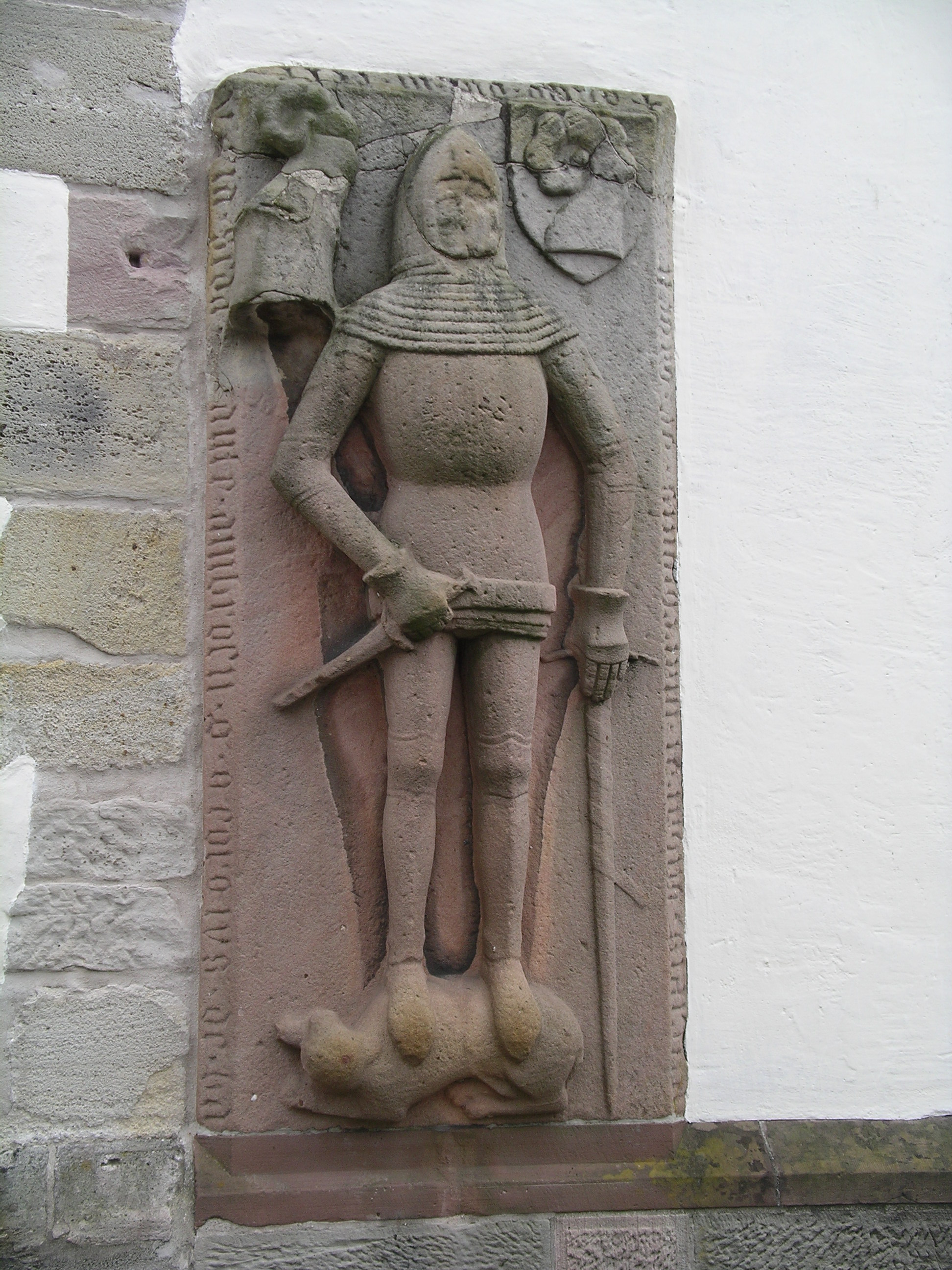 Epithaph des Ritters von Bach an der katholischen Kirche in Steinbach, Baden-Baden.